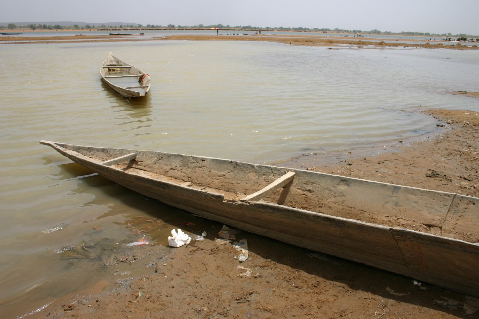 Boats in Niger River, Koulikoro, Mali, West AfricaNiger River